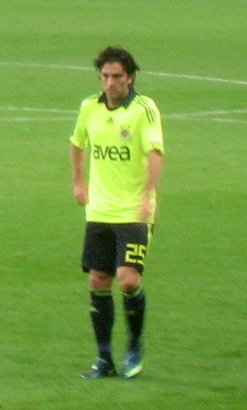 Uğur Boral